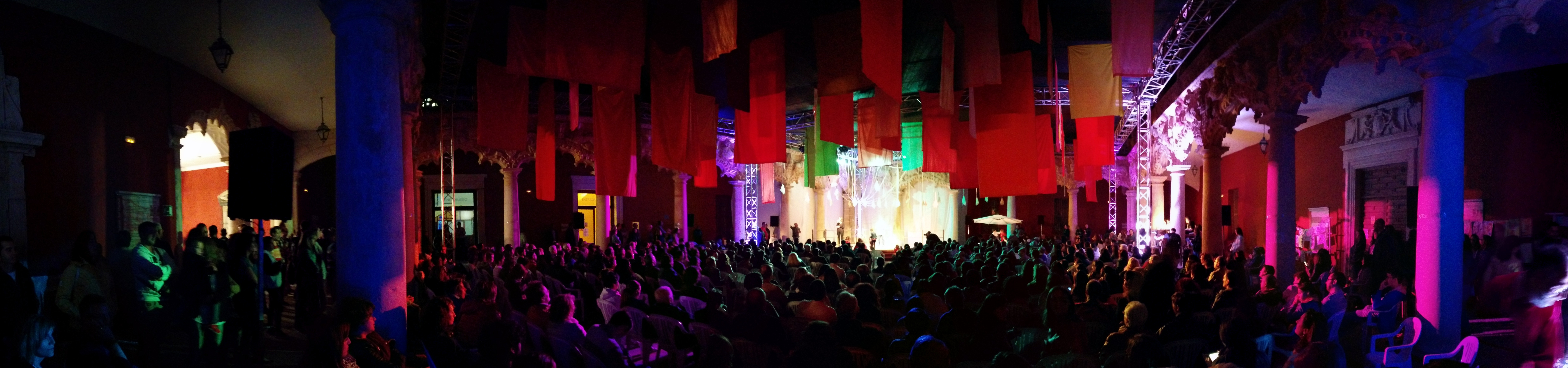 Panorámica del Palacio del Infantado durante la narración nocturna del maratón de los cuentos PANO 20150614 000626